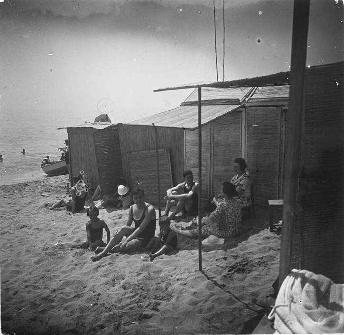 Família Durán a la platja. Josep Salvany i Blanch (1922)